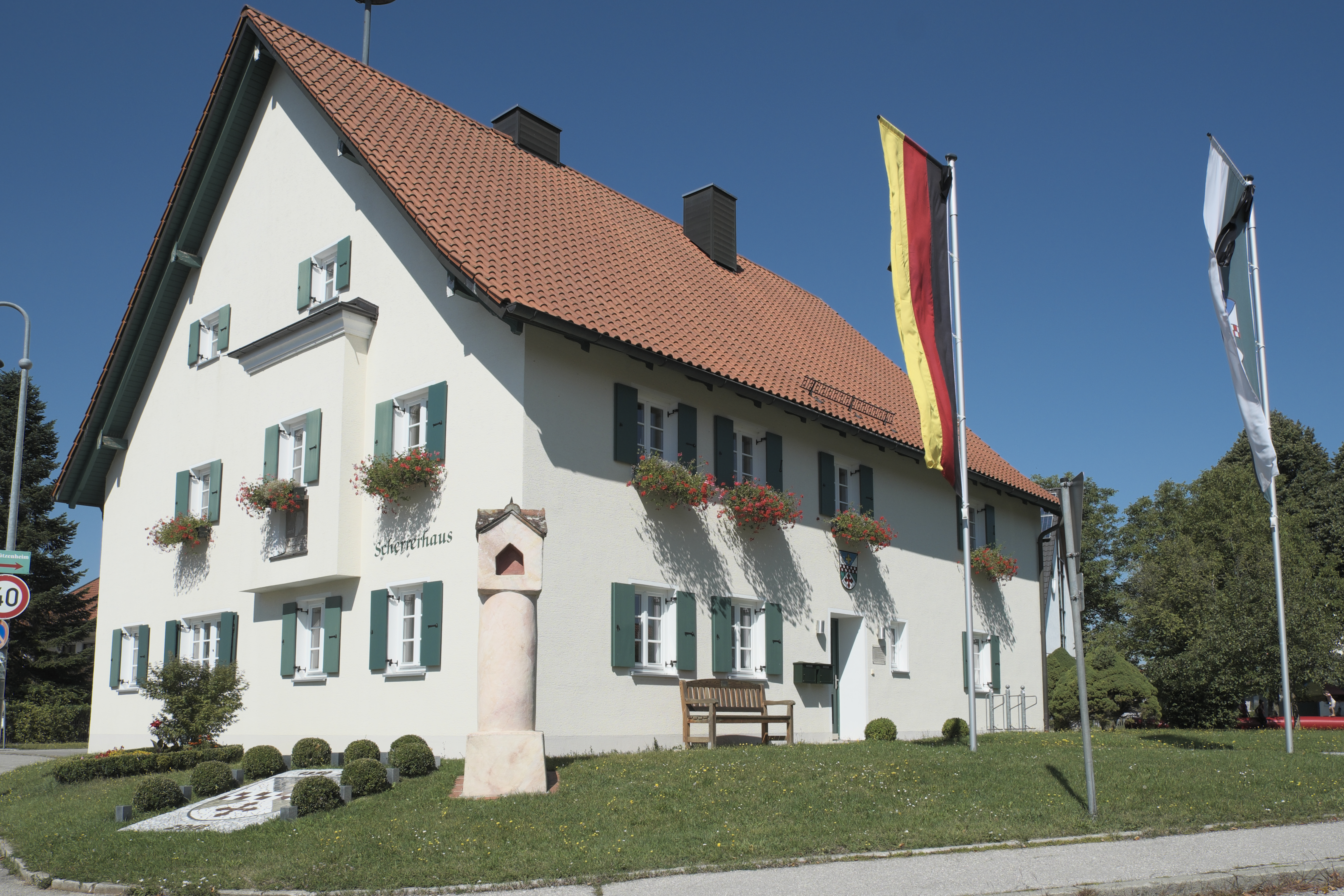 Rathaus, Scherrerhaus, in Schöngeising im Landkreis Fürstenfeldbruck (Bayern/Deutschland)